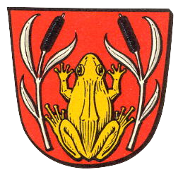 Wappen von Froschhausen